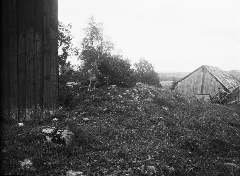 Lämning efter kyrkan, från väster. Kategori: (01) ExteriörerLämning efter kyrkan, från väster.